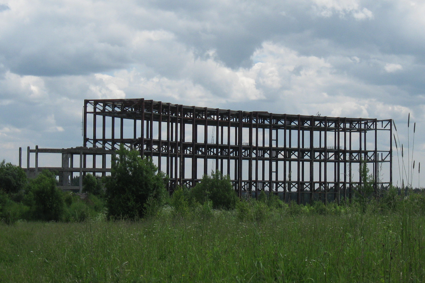 Развалины Центра информатики и электроники. Каркас одного из корпусов. Вид от полянки напротив 20-го микрорайона